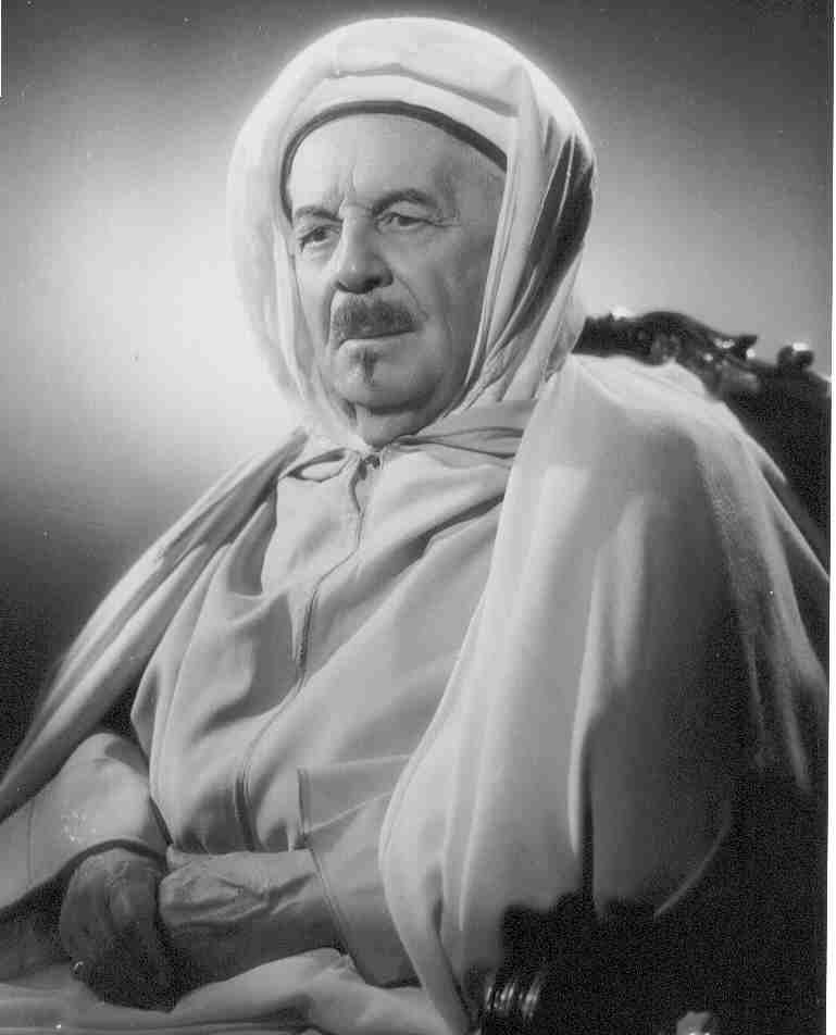 Photo si Kaddour Ben-Ghabrit